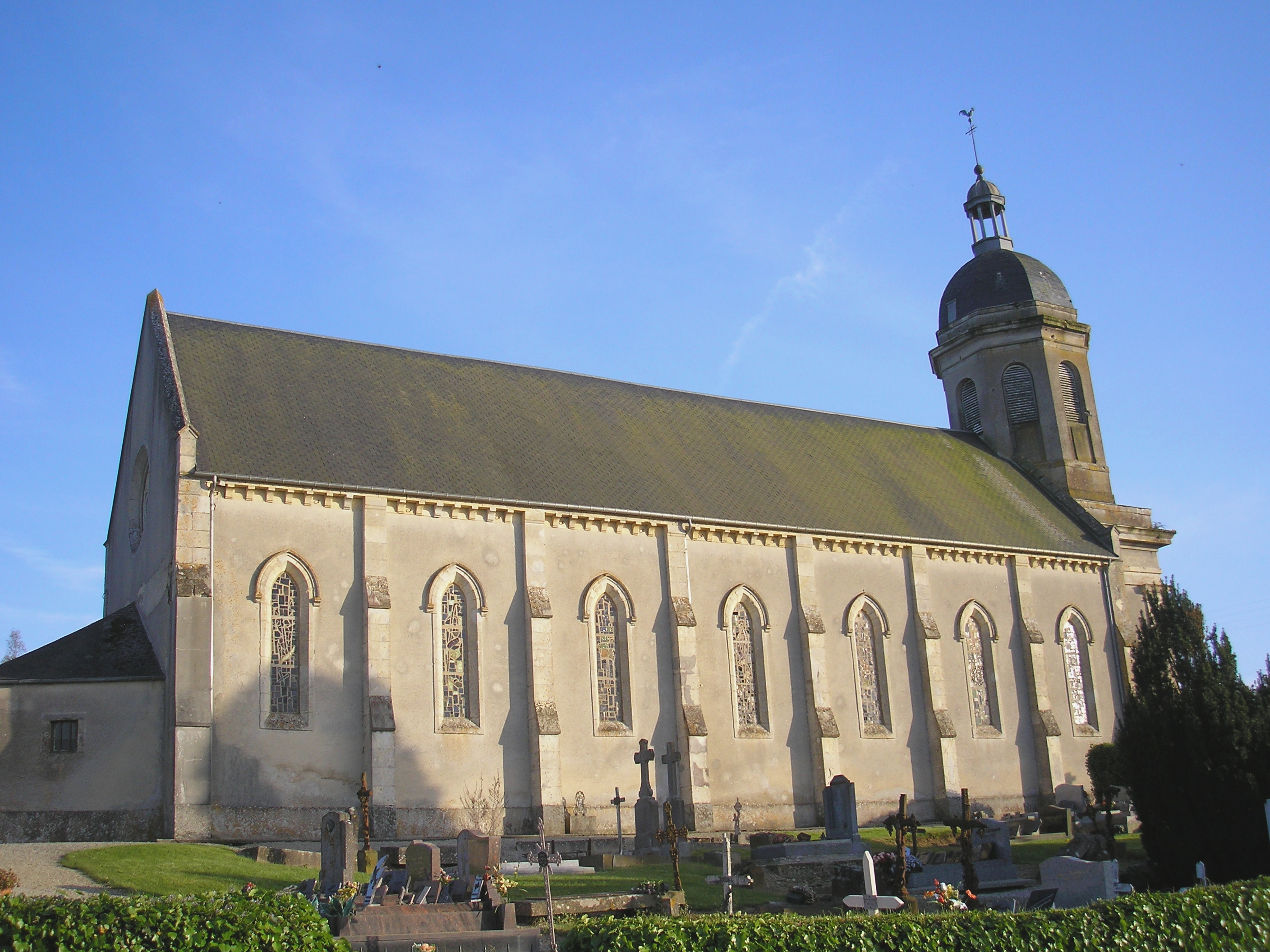 Pont-d'Ouilly (Normandie, France). L'église Saint-Jean-Baptiste d'Ouilly.